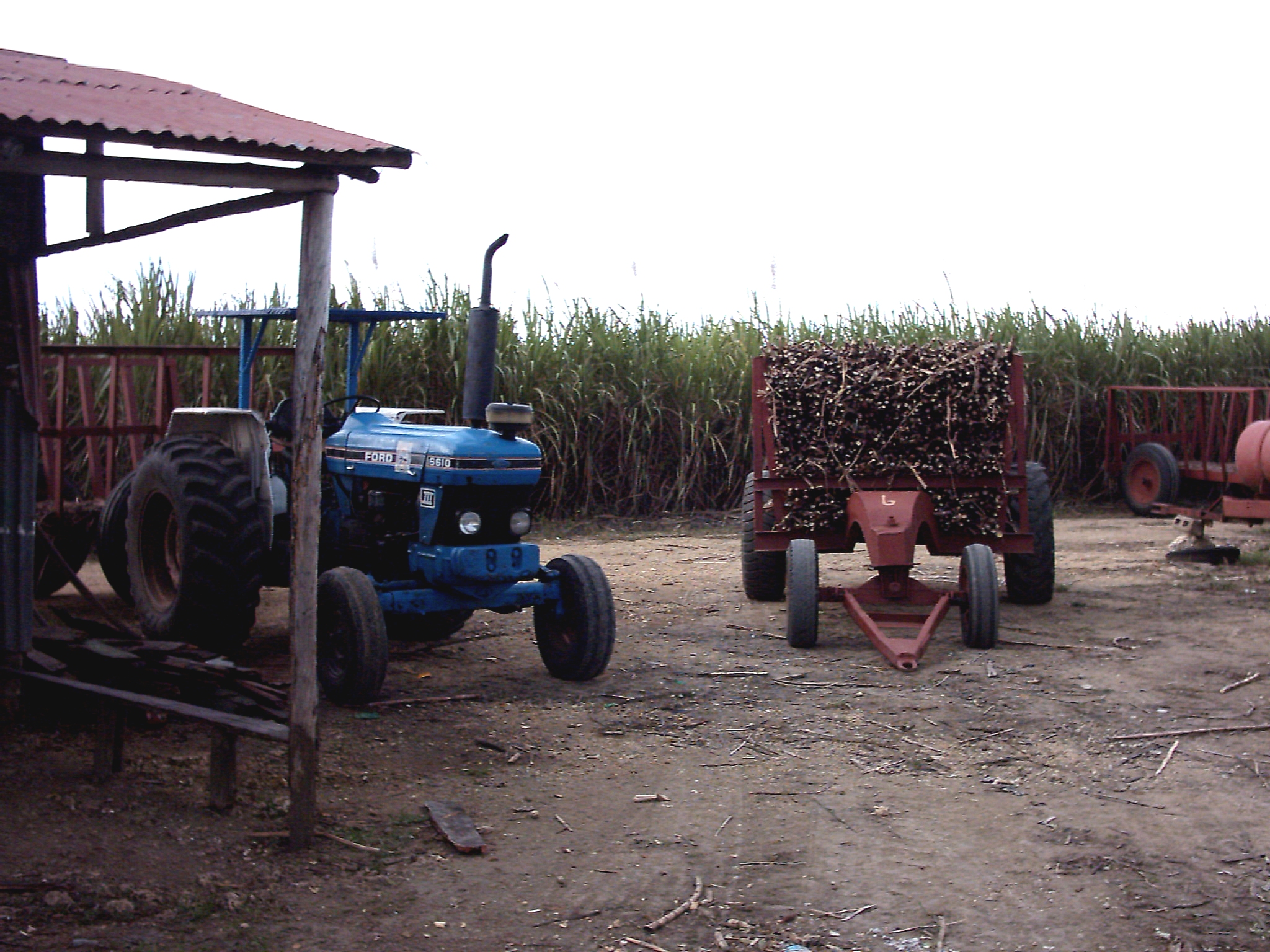 Ernte und Transport von Zuckerrohr